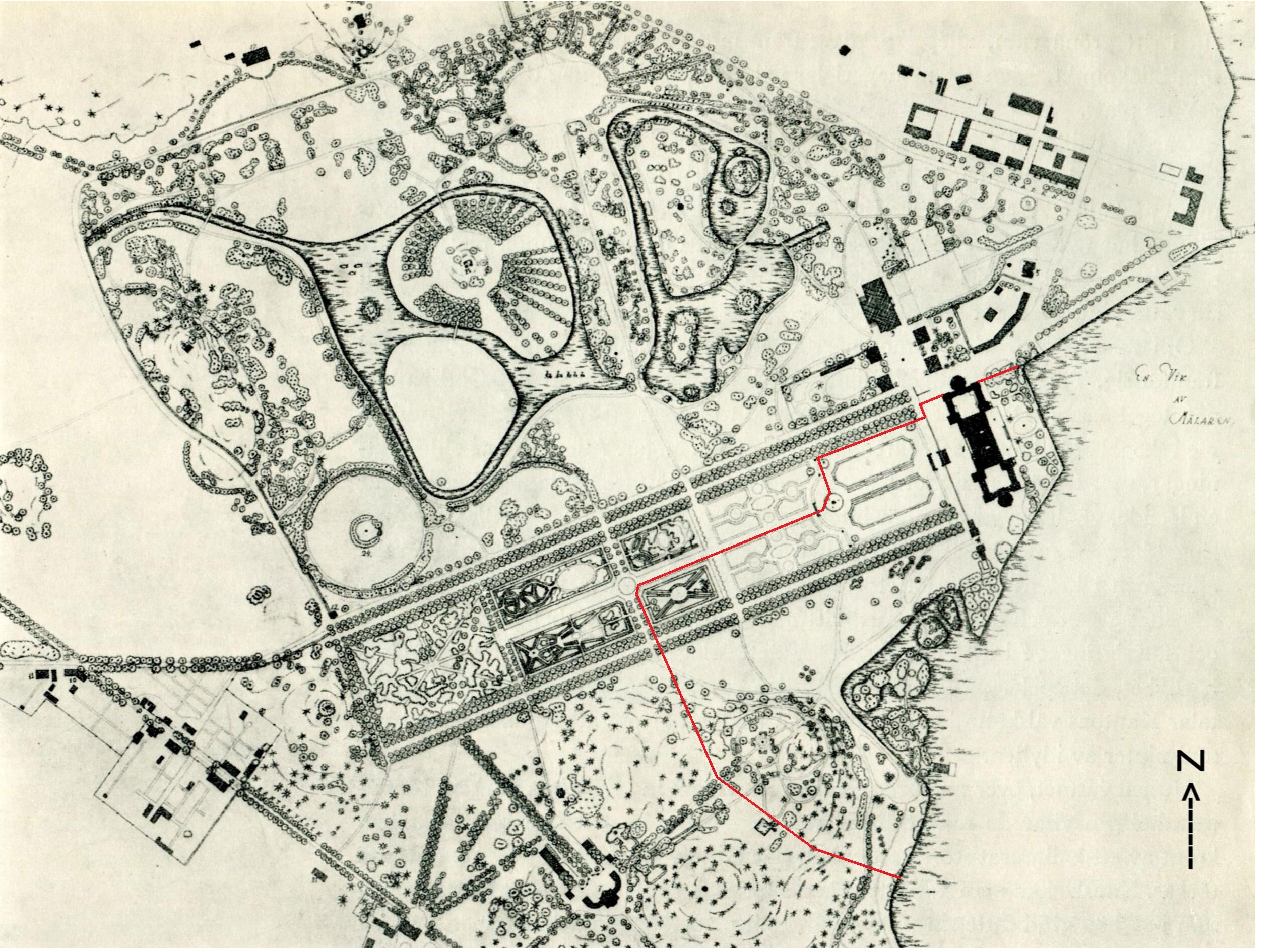 Plan över Drottningholms slott och park, röd linje markerar utsträckningen av slottets skyddsobjekt.